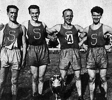 Bei engem Tournoi zu Belfort: Pierre Hemmer, François Mersch, Martin a Jean Krombach Original caption: "A.Z. AKTUALITÄTEN -- Hemmer, Mersch, Martin, Krombach, gewannen den Challenge des „Jour“ in Rekordzeit."